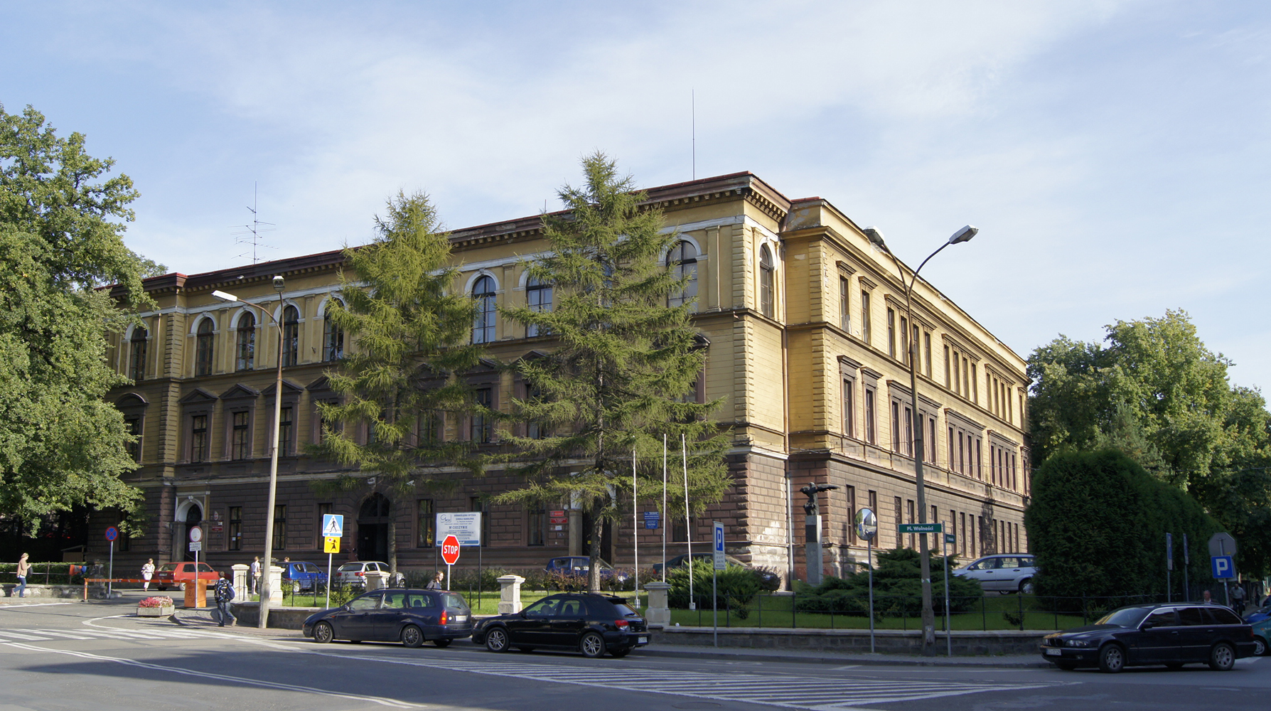 Cieszyn